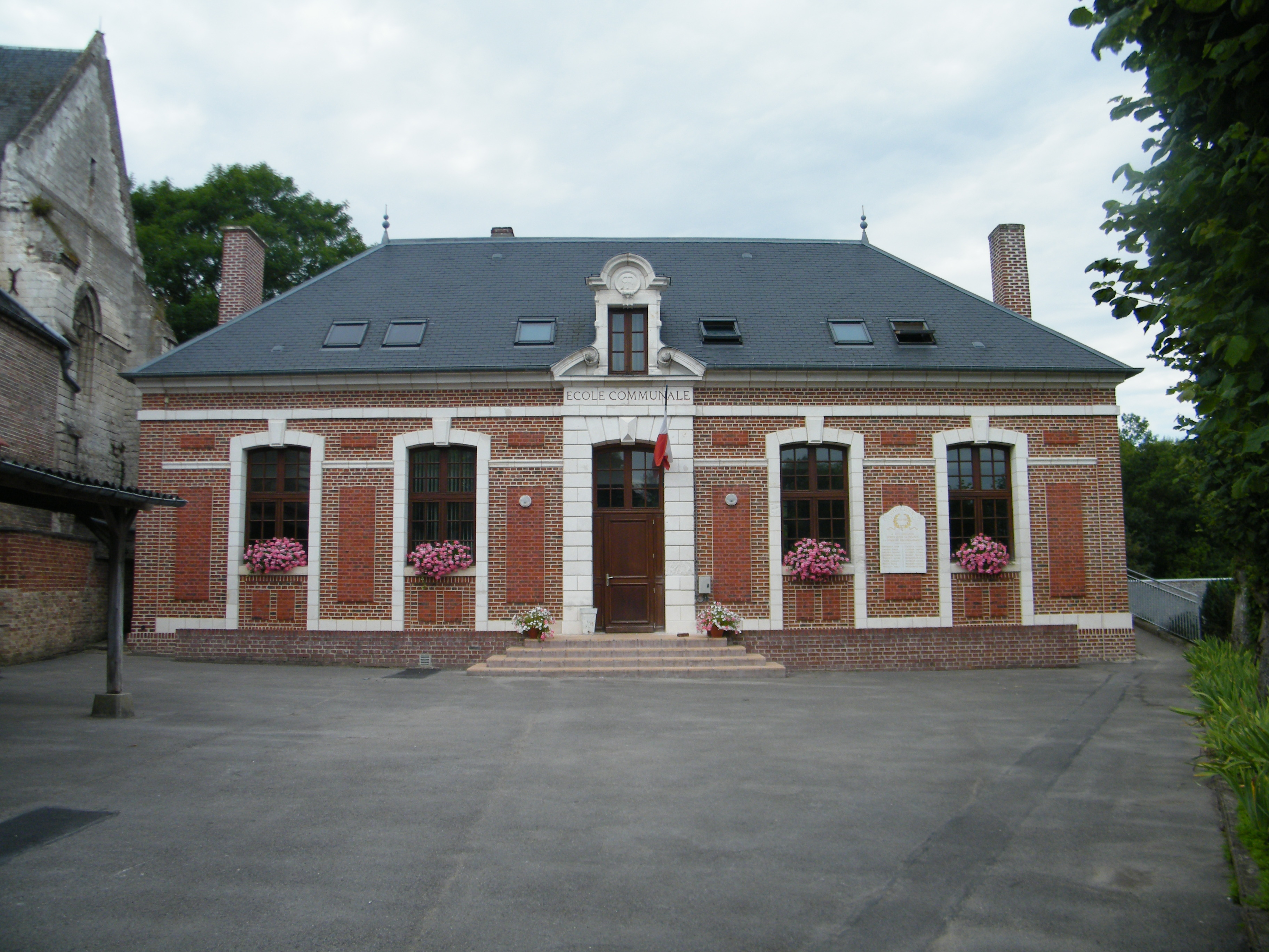 Mairie, installée dans l'ancienne école.